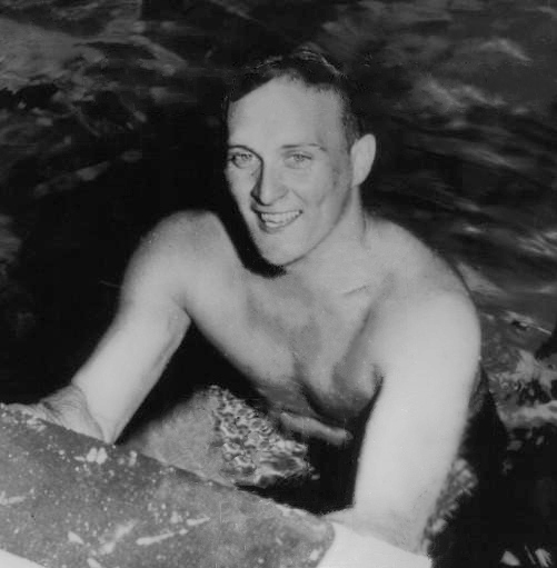 1949 PRESS PHOTO JOE VERDEUR SWIMMING VICTORY GRIN